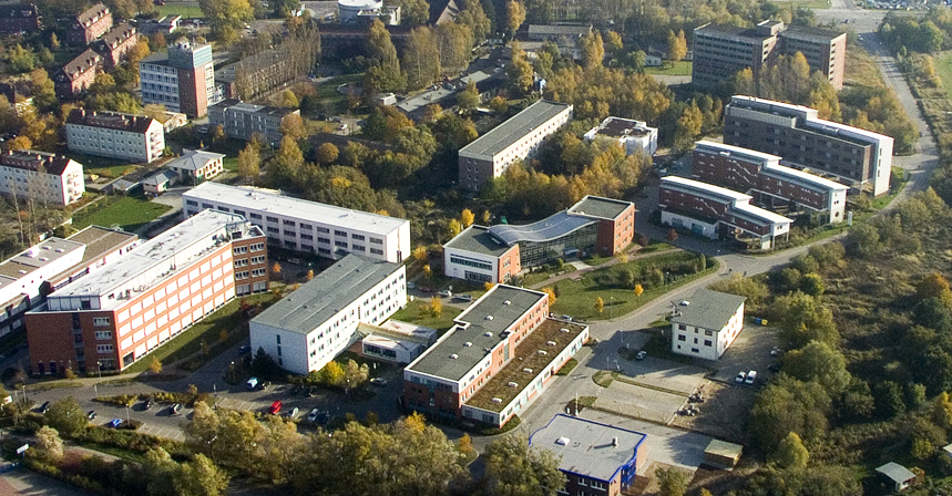 Luftbild Technlogiecampus Warnemünde (Technologiezentrum an der Ostsee, Rostock)